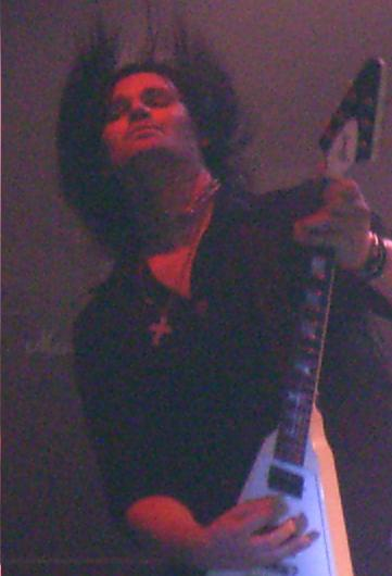 Sascha Gerstner with Helloween Live at Löwensall in Nuremberg 18.01.2006